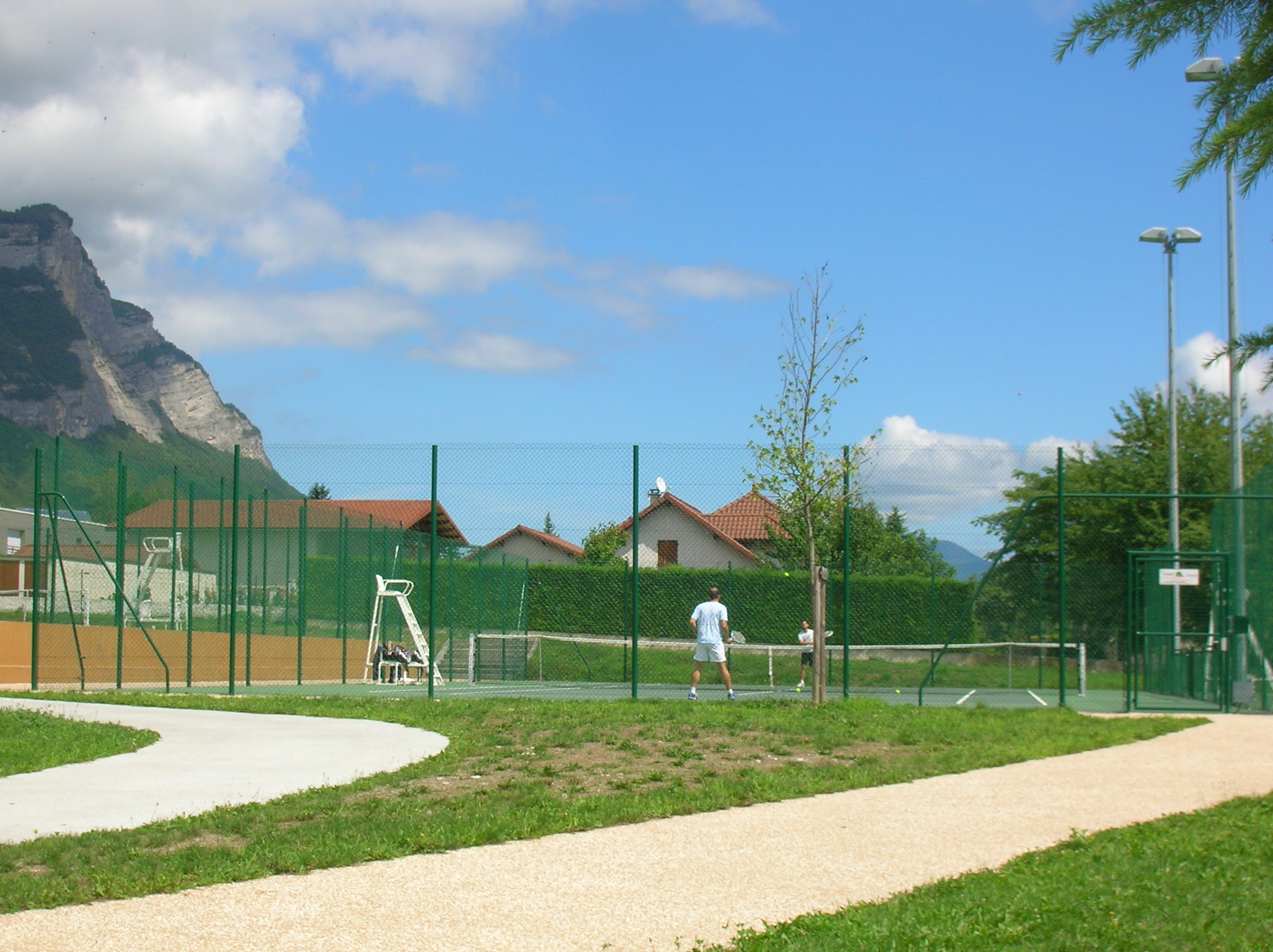 Crolles, Isère, France. tennis du gymnase Léo Lagrange